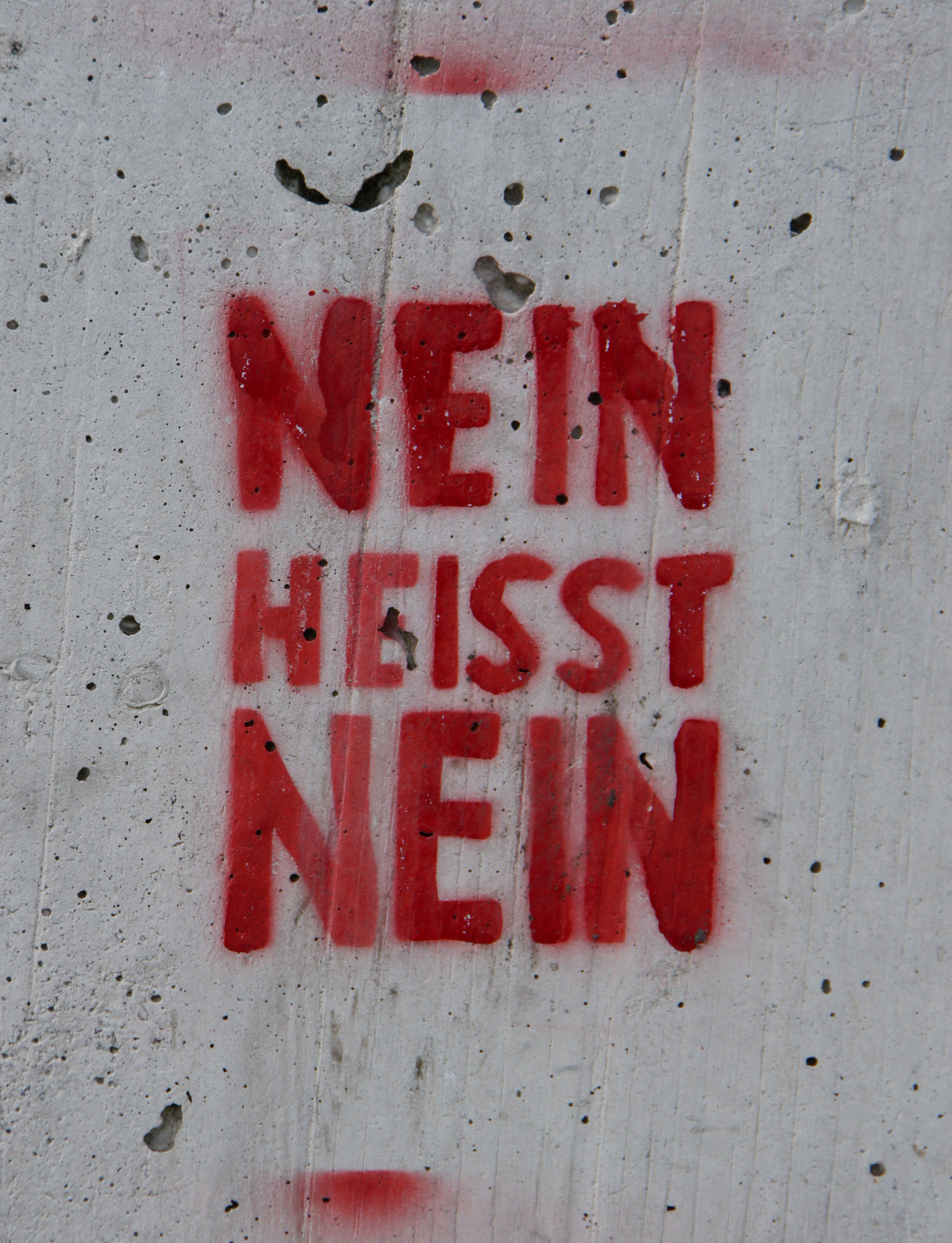 no is no